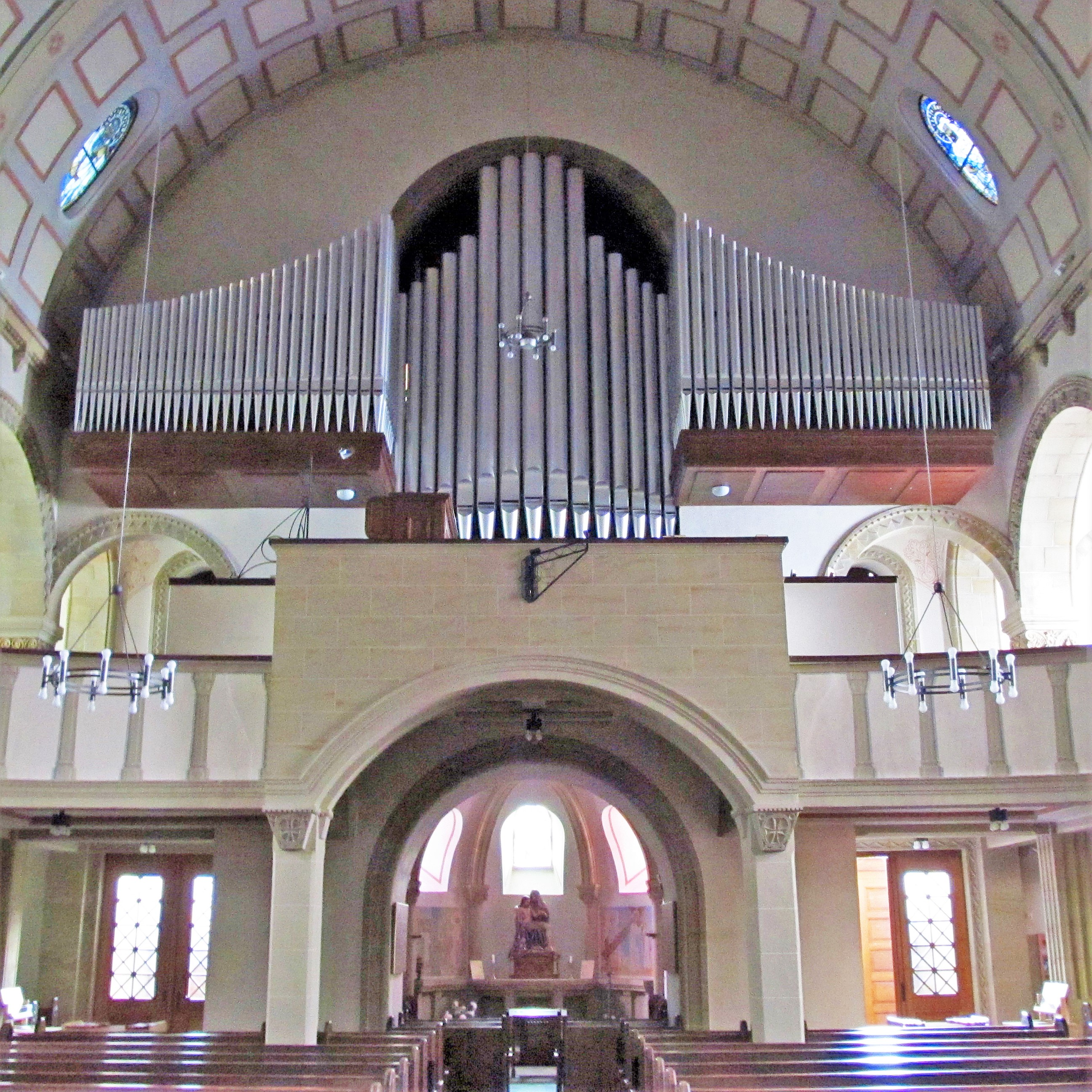 Orgelprospekt der katholischen Pfarrkirche St. Paulinus in Lauterbach, einem Stadtteil von Völklingen, Saarland